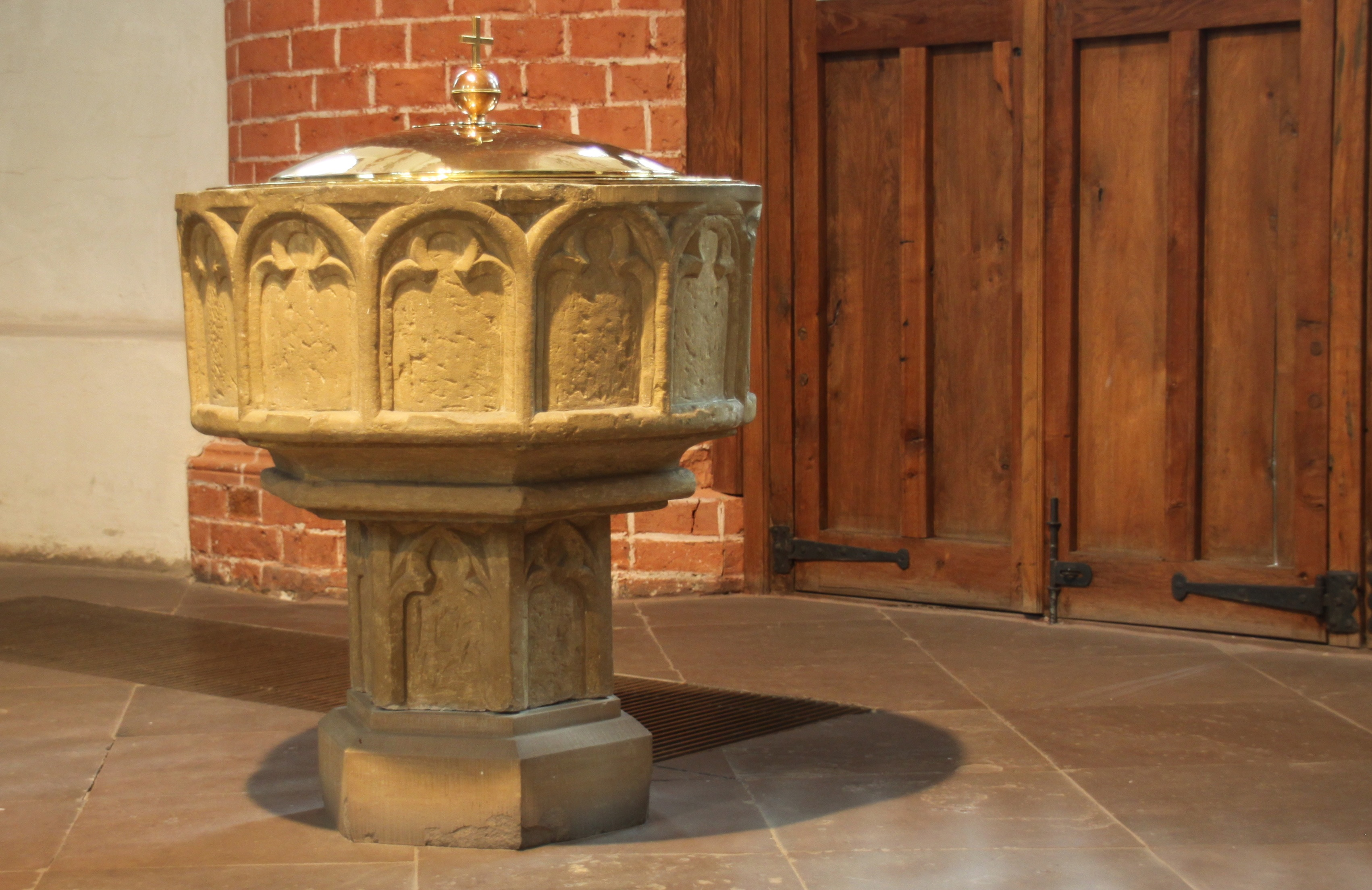 Taufbecken der Ludgerikirche Norden (Ostfriesland)